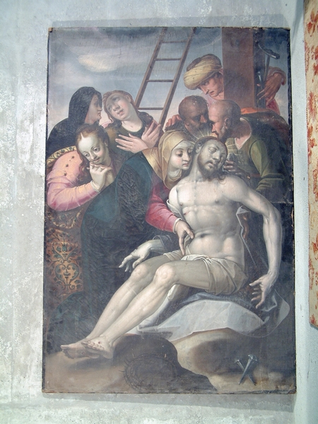 Tafelbild